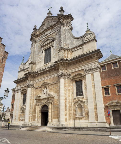 Baroque Sint-Walburgakerk (Brugge)